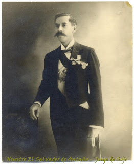 Araujo 1911